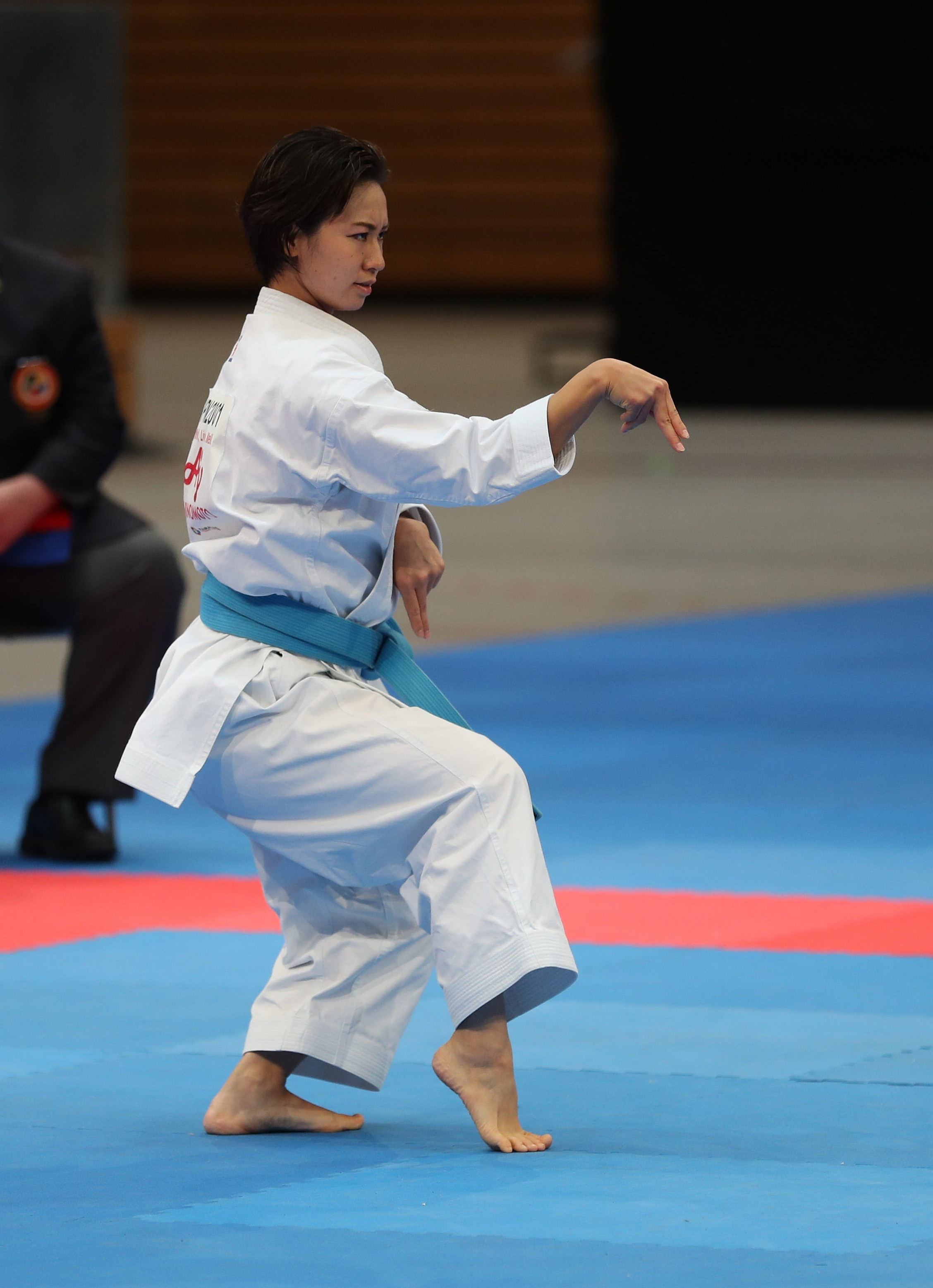 Female Kata am 16. September 2018 in der Karate1 Premier League Berlin 2018. Abgebildet: Emiri Iwamoto.